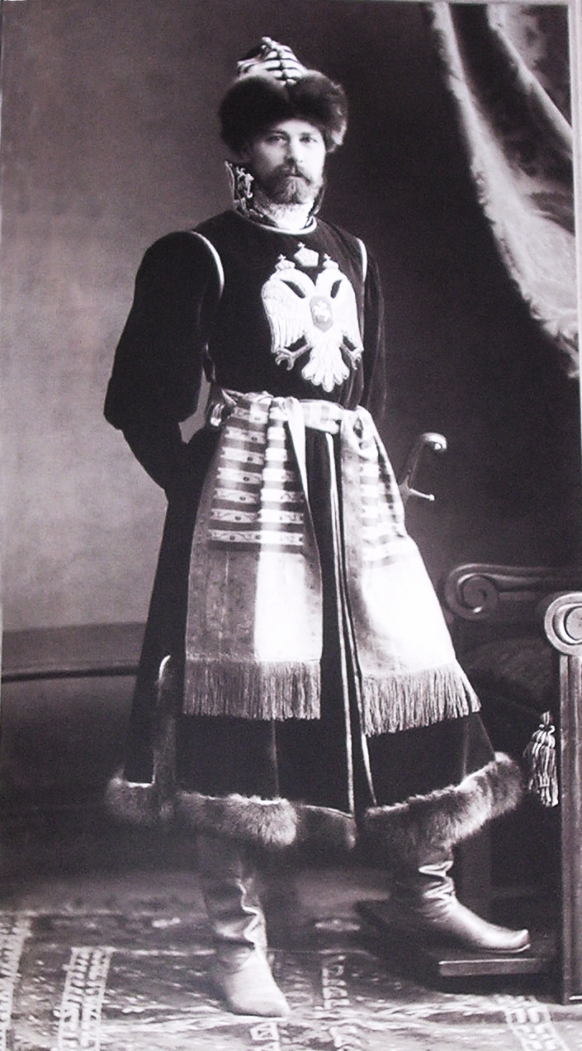 Светлейший князь Дмитрий Борисович Голицын, начальник императорской охоты, на костюмированном балу 1903 года.